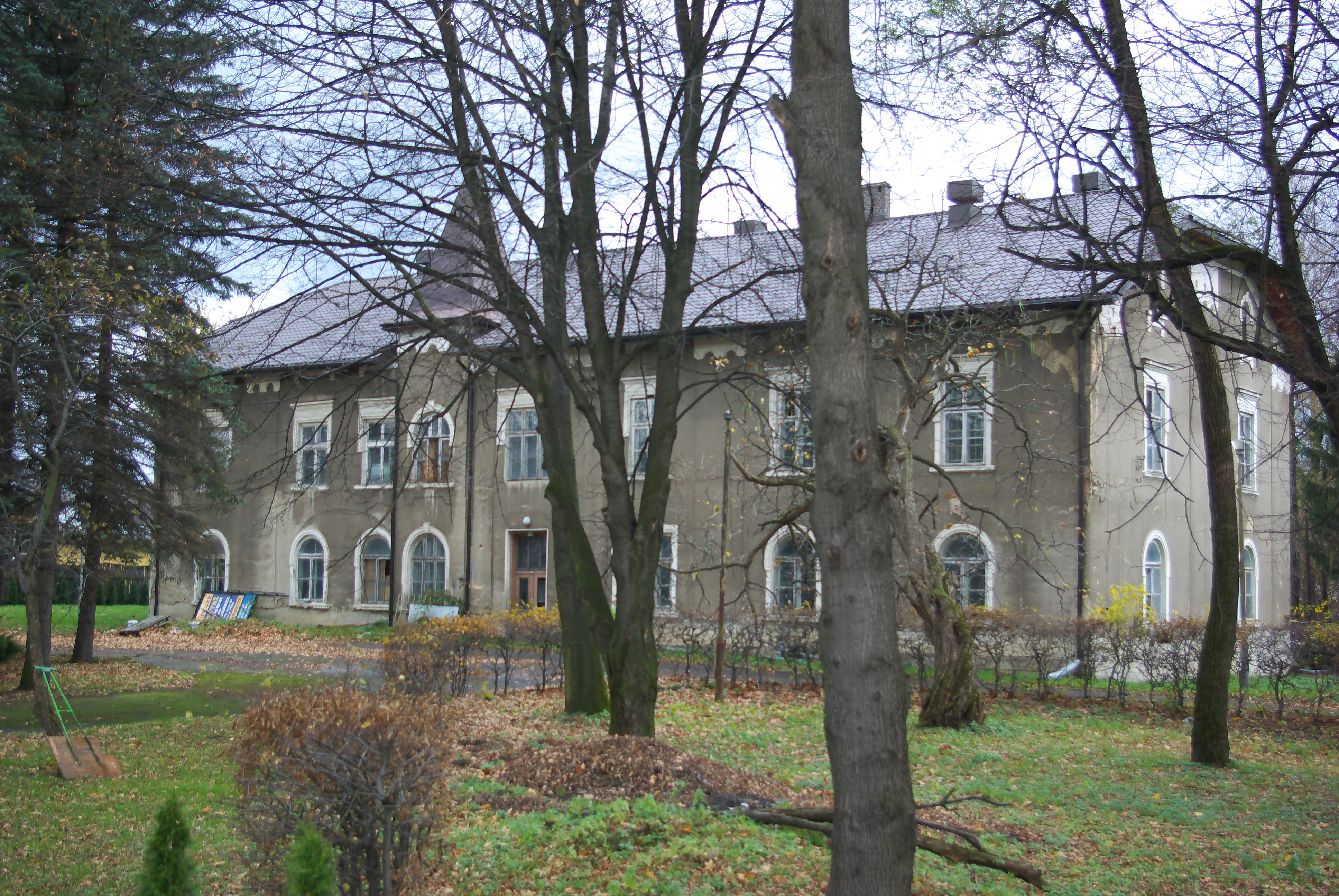 Dwór Mniszek-Tchorznickich w dzielnicy Dąbrówka w Sanoku